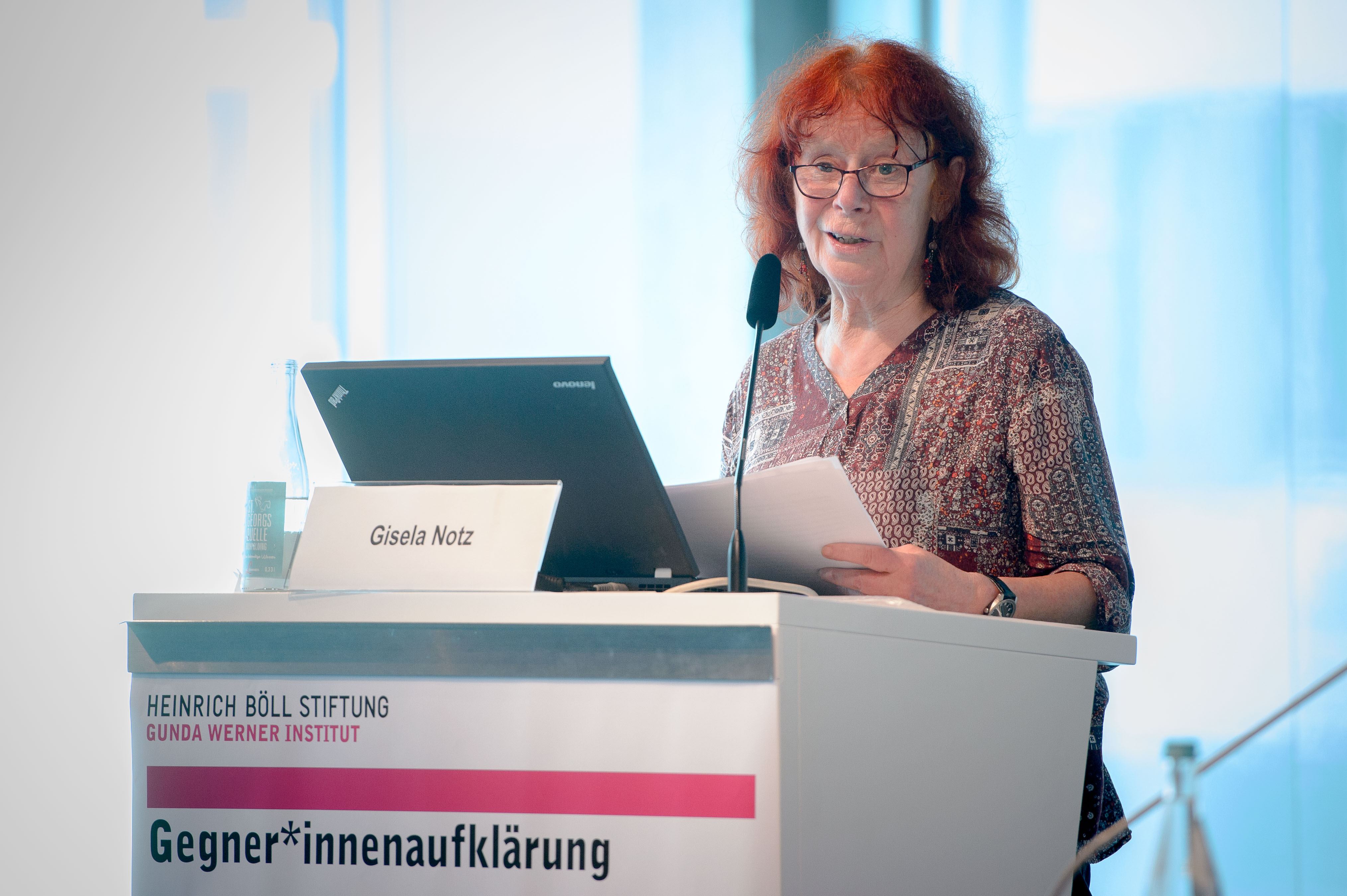 Dr. Gisela Notz (Sozialwissenschaftlerin und Historikerin, Berlin), Foto